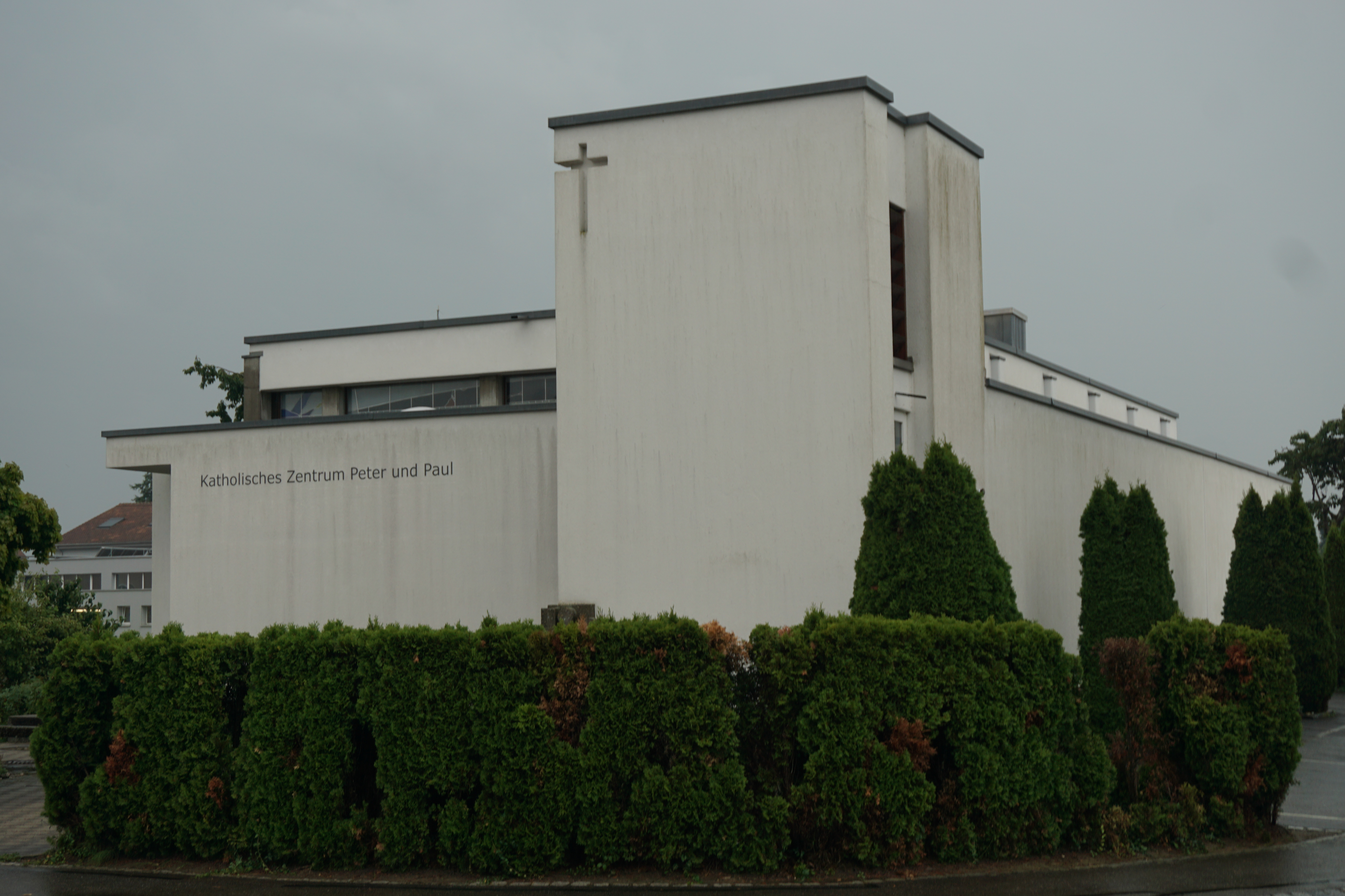 Nordecke der Peter und Paulkirche